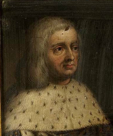 Détail d'un portrait de Mathieu Ier et de son épouse. Musée des Offices, Florence (Inv. 1890, 616)